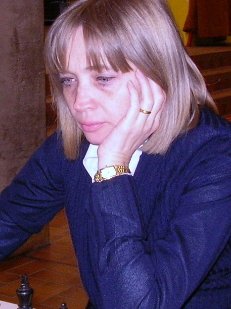 Elena Sedina, Schachbundesliga der Frauen am 20. Januar 2012 in Karlsruhe.